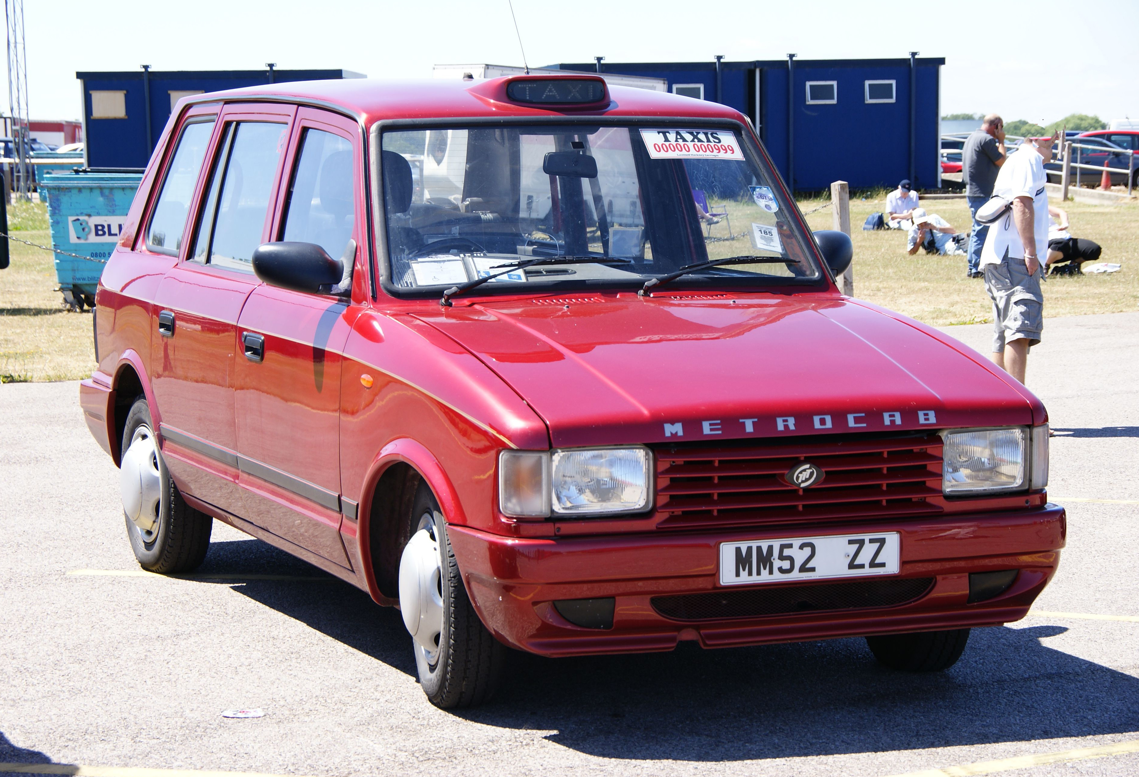 2002 Metrocab (London cab, 2446cc diesel)